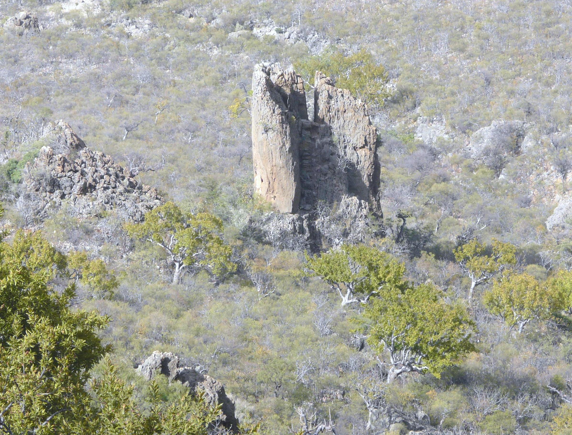 صورة لصخرة منحوتة بشكل جذع شجرة بفعل عوامل التعرية. الصورة أخذت في أحد جبال حديبو عاصمة جزيرة سقطرى.